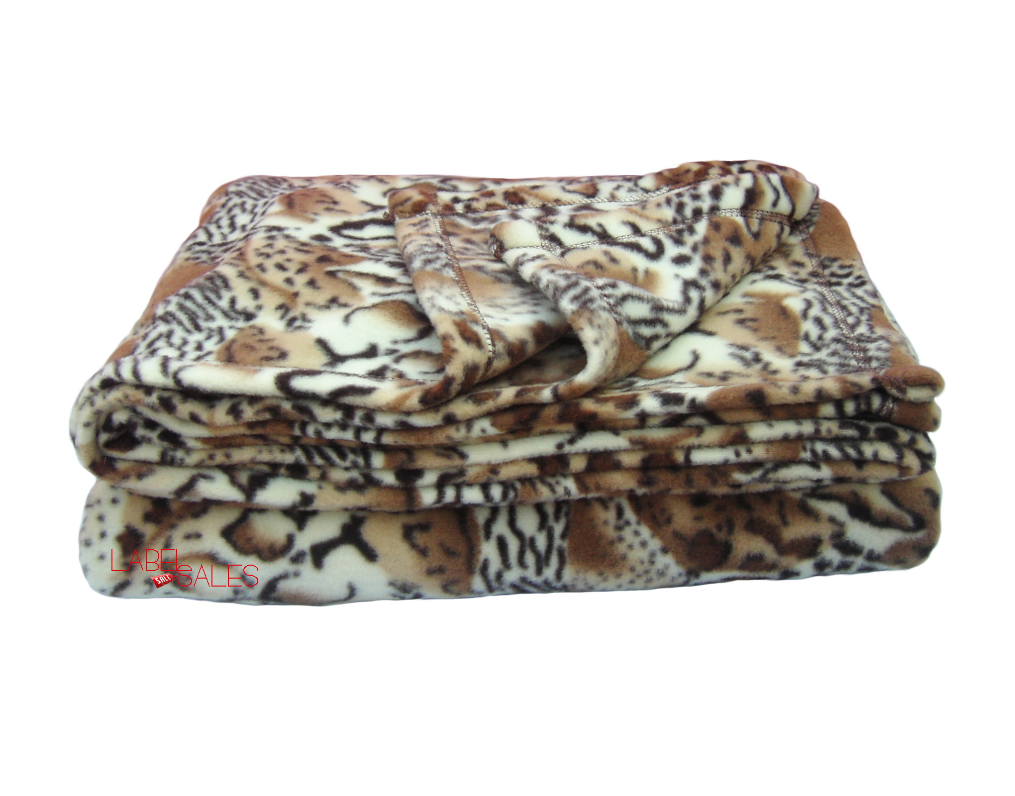 ผ้าห่ม สำลี สำหรับแจก บริจาค